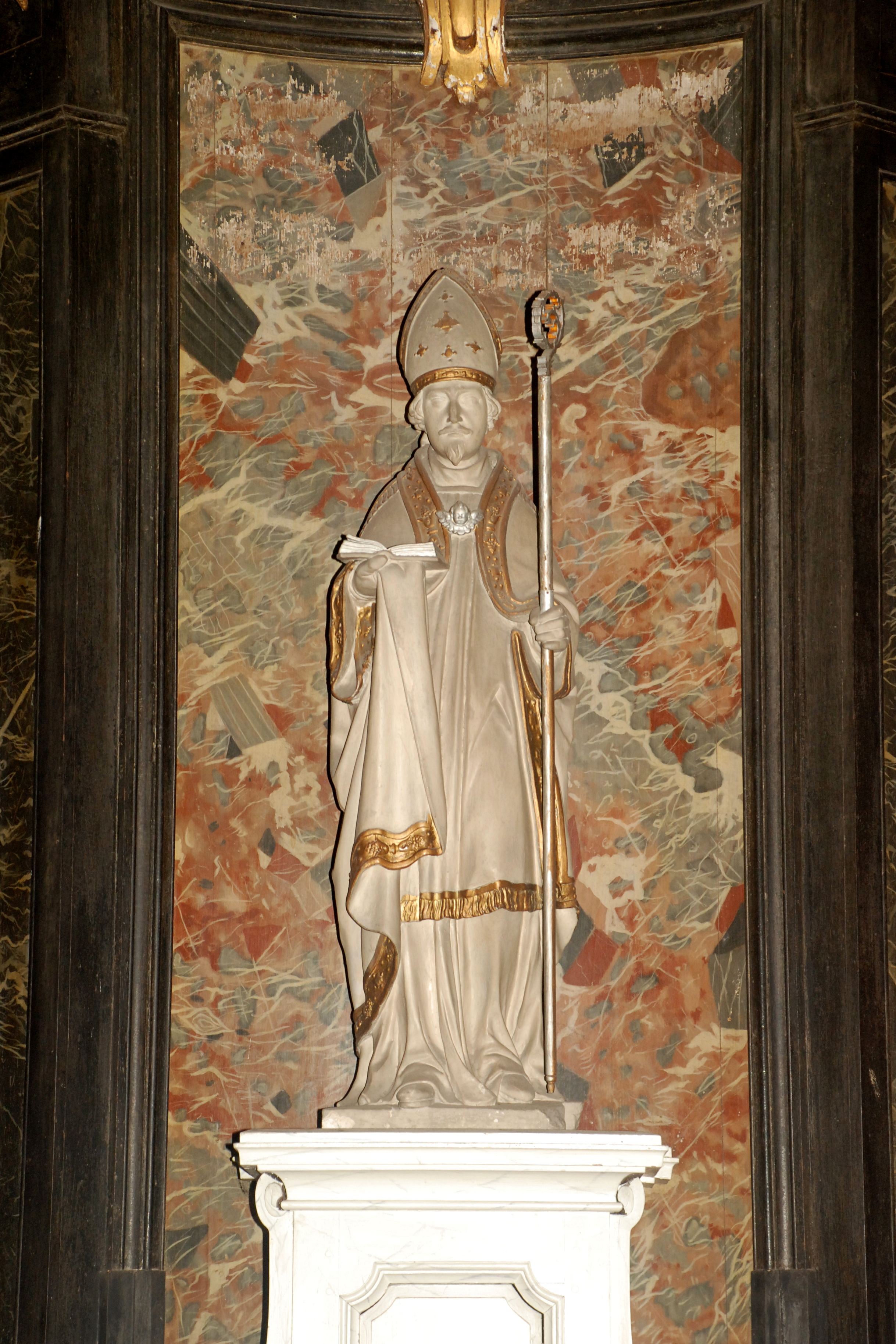 Belgique - Brabant wallon - Église Saint-Martin de Ways